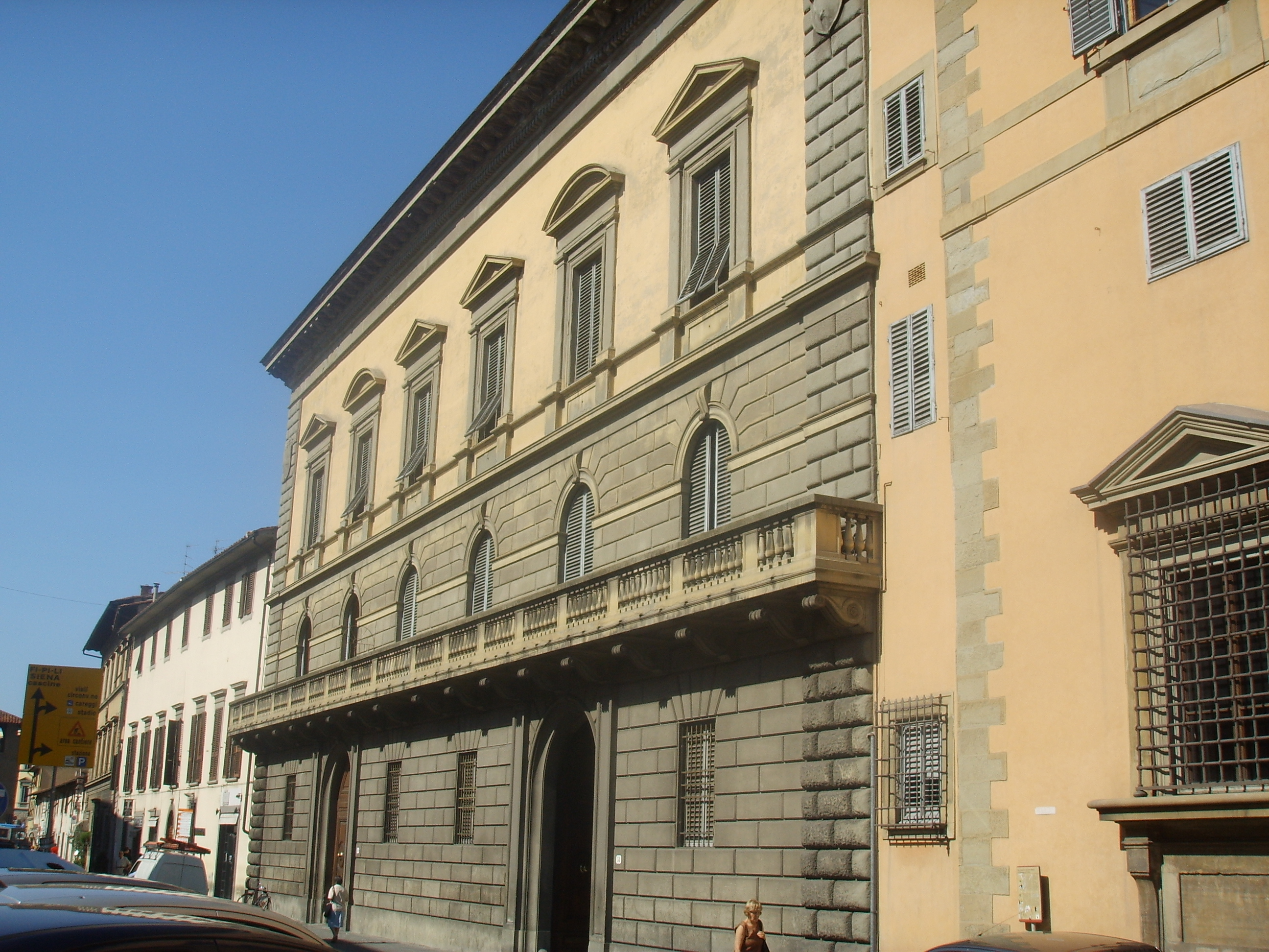 Palazzo Corsini al Prato in Florence, italy